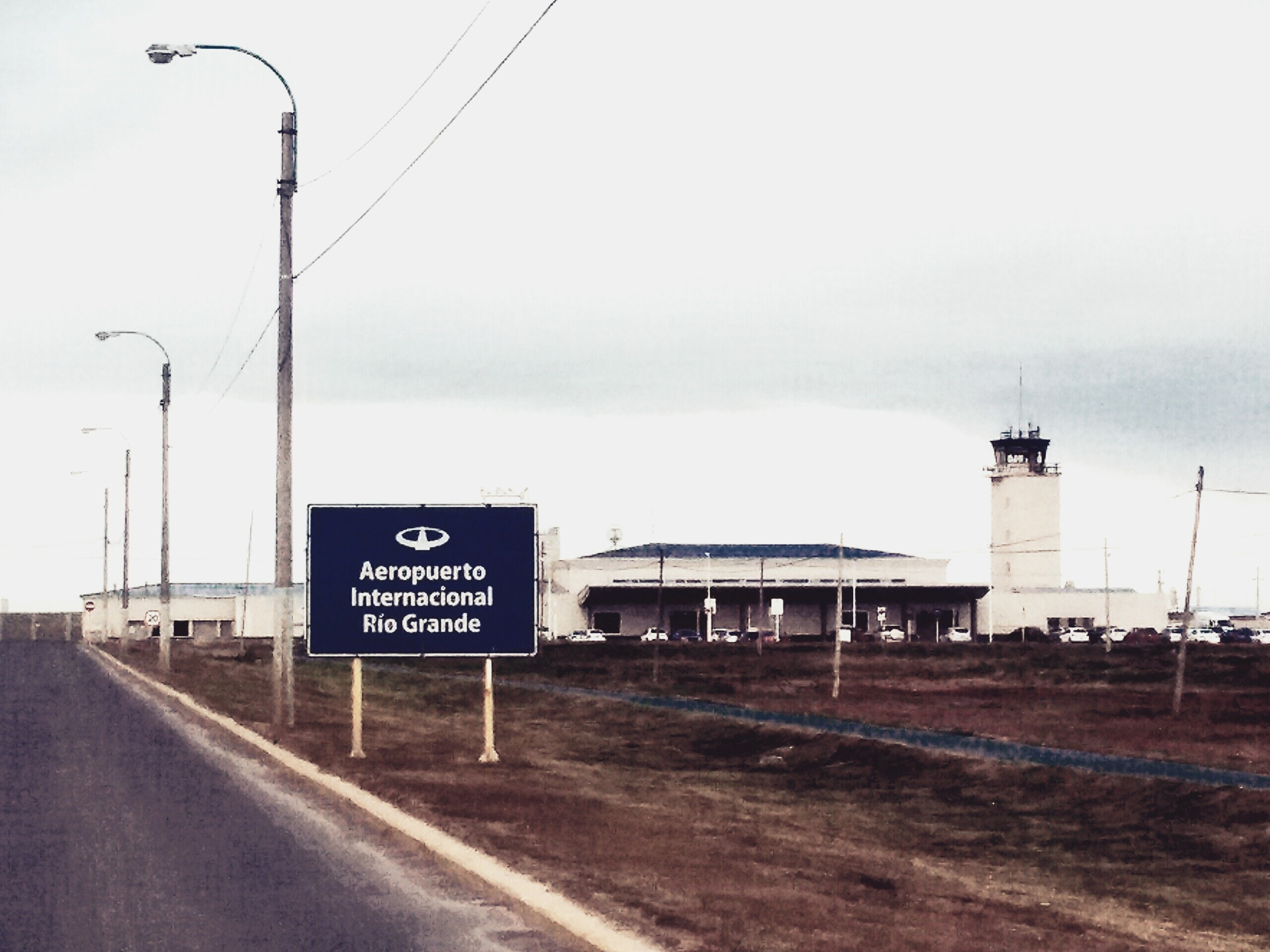 Aeropuerto de Tierra del fuego en su ingreso